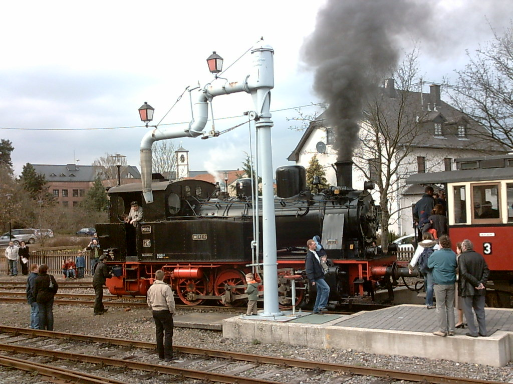 Dampflok "Merzig" (ehem. "Saarberg 26") des Eisenbahnmuseums Losheim